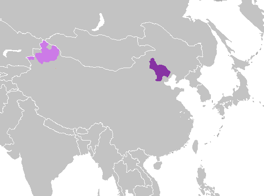 Dialecto Mandarín pekinés